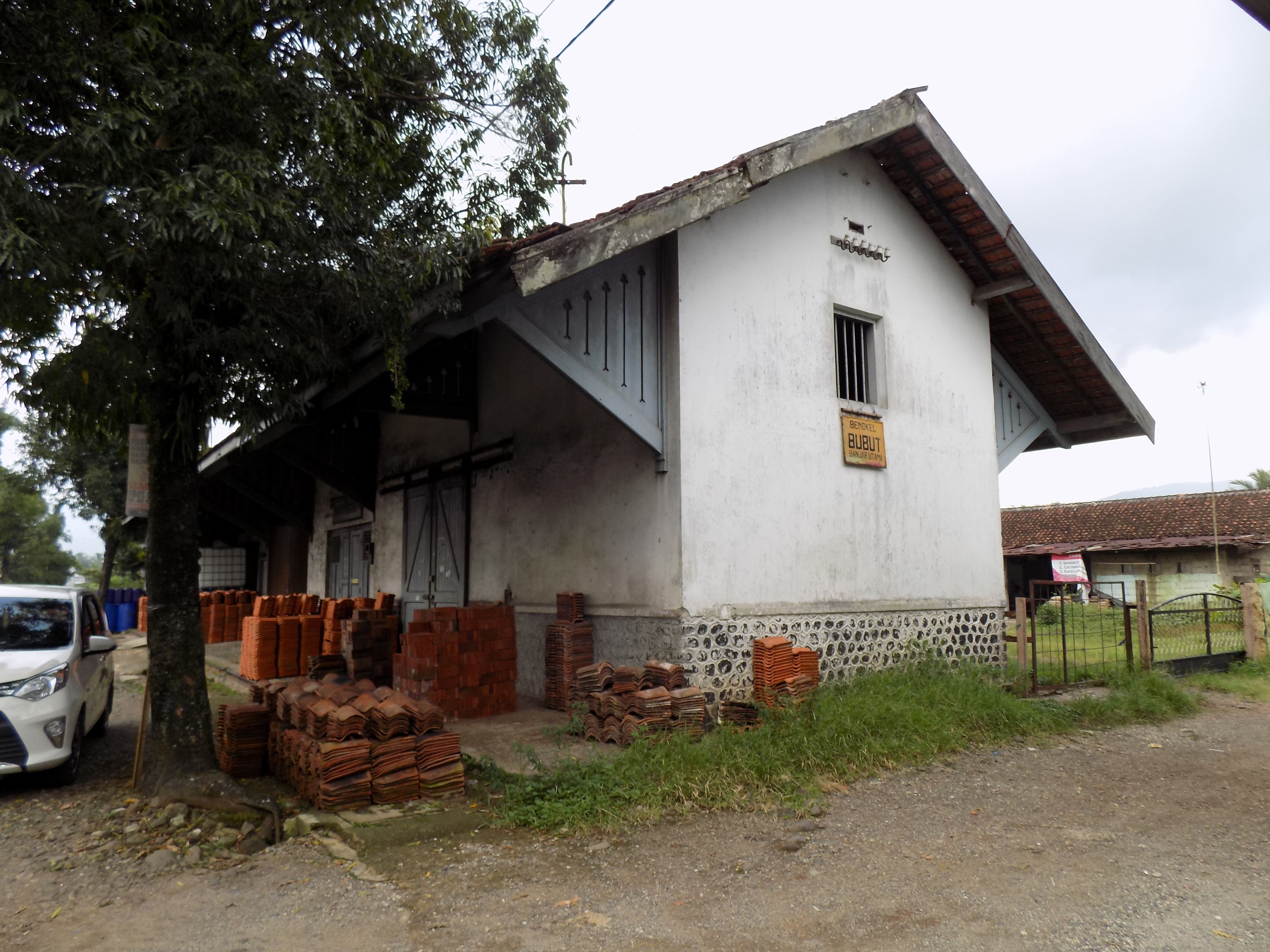 Stasiun Banjarnegara